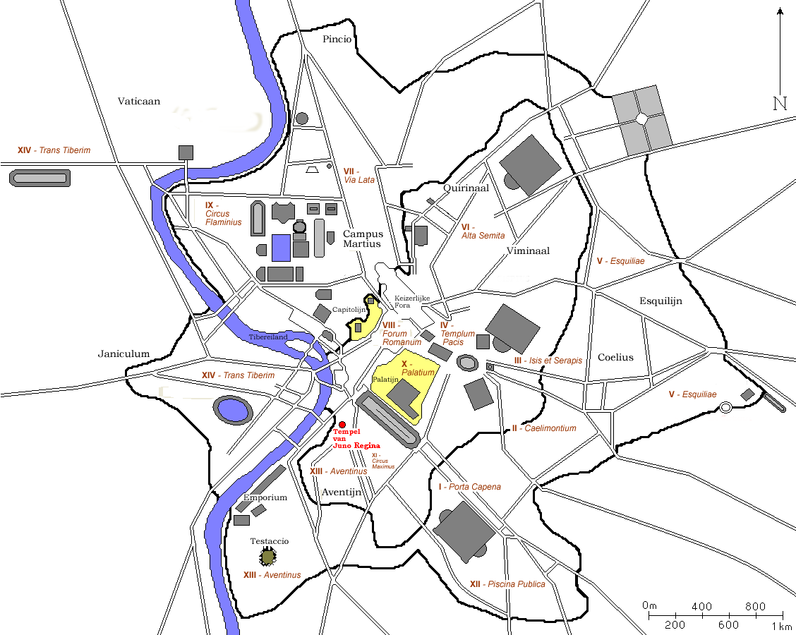 Kaart van antiek Rome waarop de Tempel van Juno Koningin (Aventijn) is uitgelicht. Kaart is afkomstig van FR:wiki en door mij naar een Nederlandse versie bewerkt.